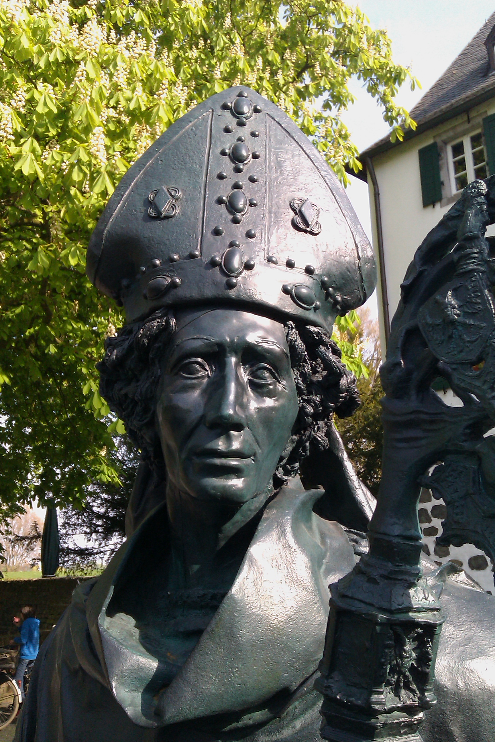 Denkmal des Zonser Stadtgründers Friedrich von Saarwerden